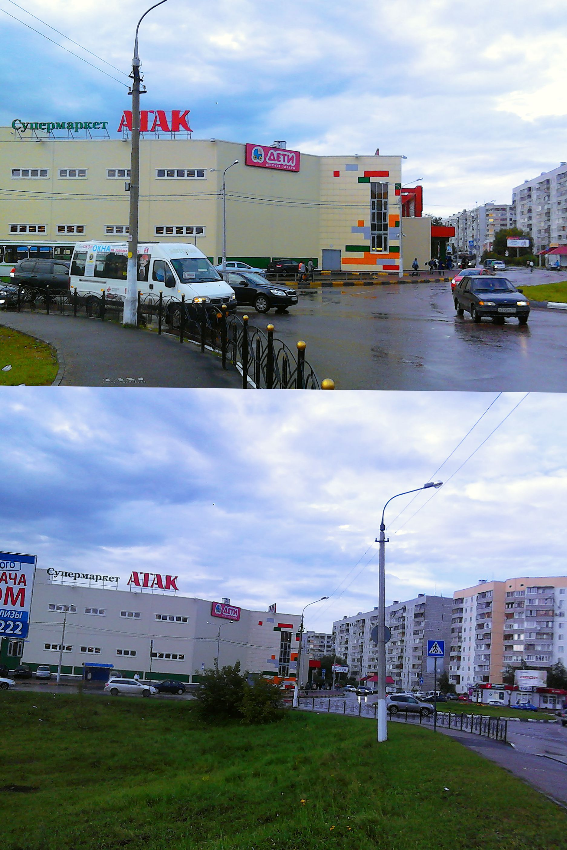 Супермаркет "Атак", г. Орехово-Зуево. Перекресток ул. 1905 г., Северная, Парковская. Сентябрь 2013